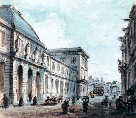 Hôtel des Monnaies (Paris). Façade sur la rue Guénégaud. Dessin à la plume et encre brune, rehauts d'aquarelle sur papier bleuté, par Jean-Baptiste Gautier Dagoty (1740-1786).